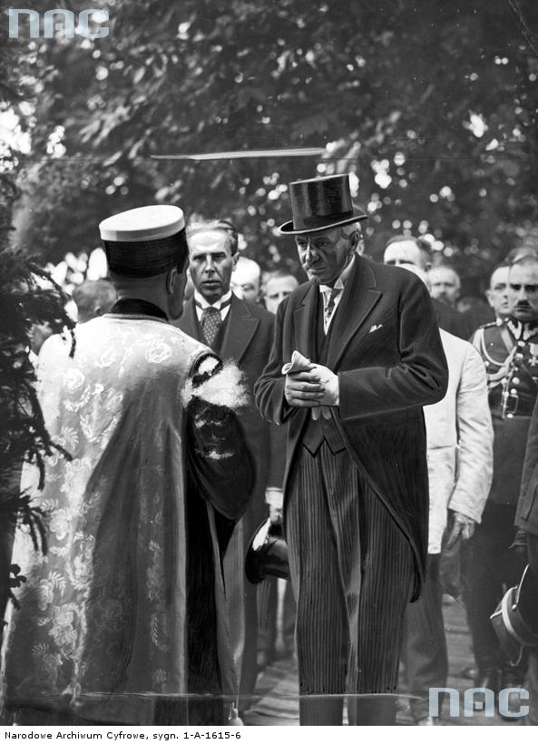 Президент Польской Республики Игнаций Мосцицкий во время визита к караимам Луцка. Июнь 1929 года.